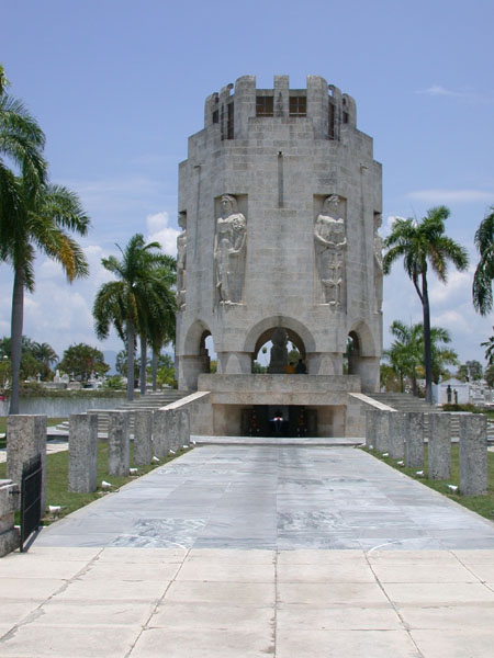 Grabmal von José Martí auf dem Cementerio Santa Ifigenia in Santiago de Kuba.